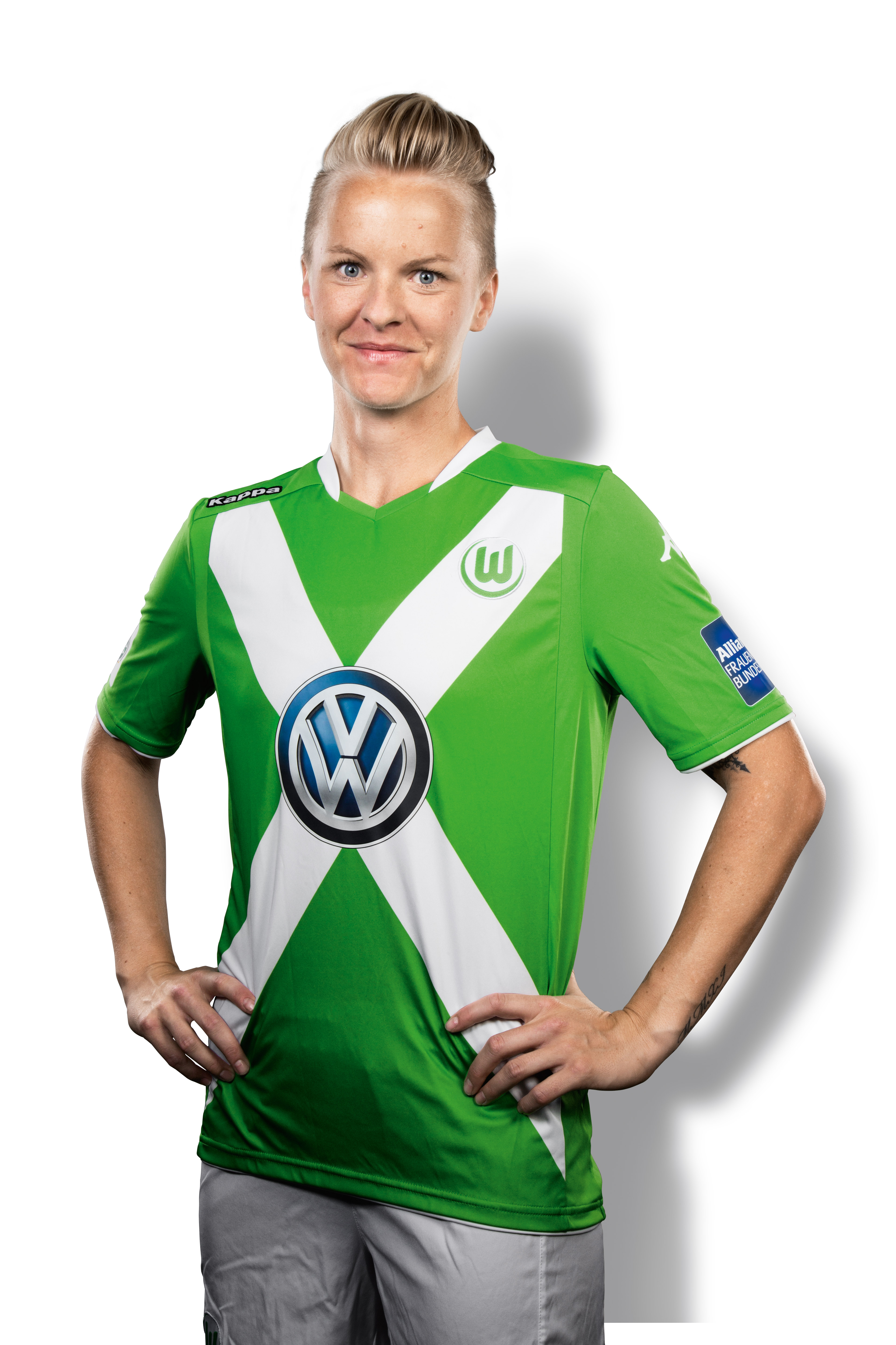 Fotbollsspelaren Nilla Fischer